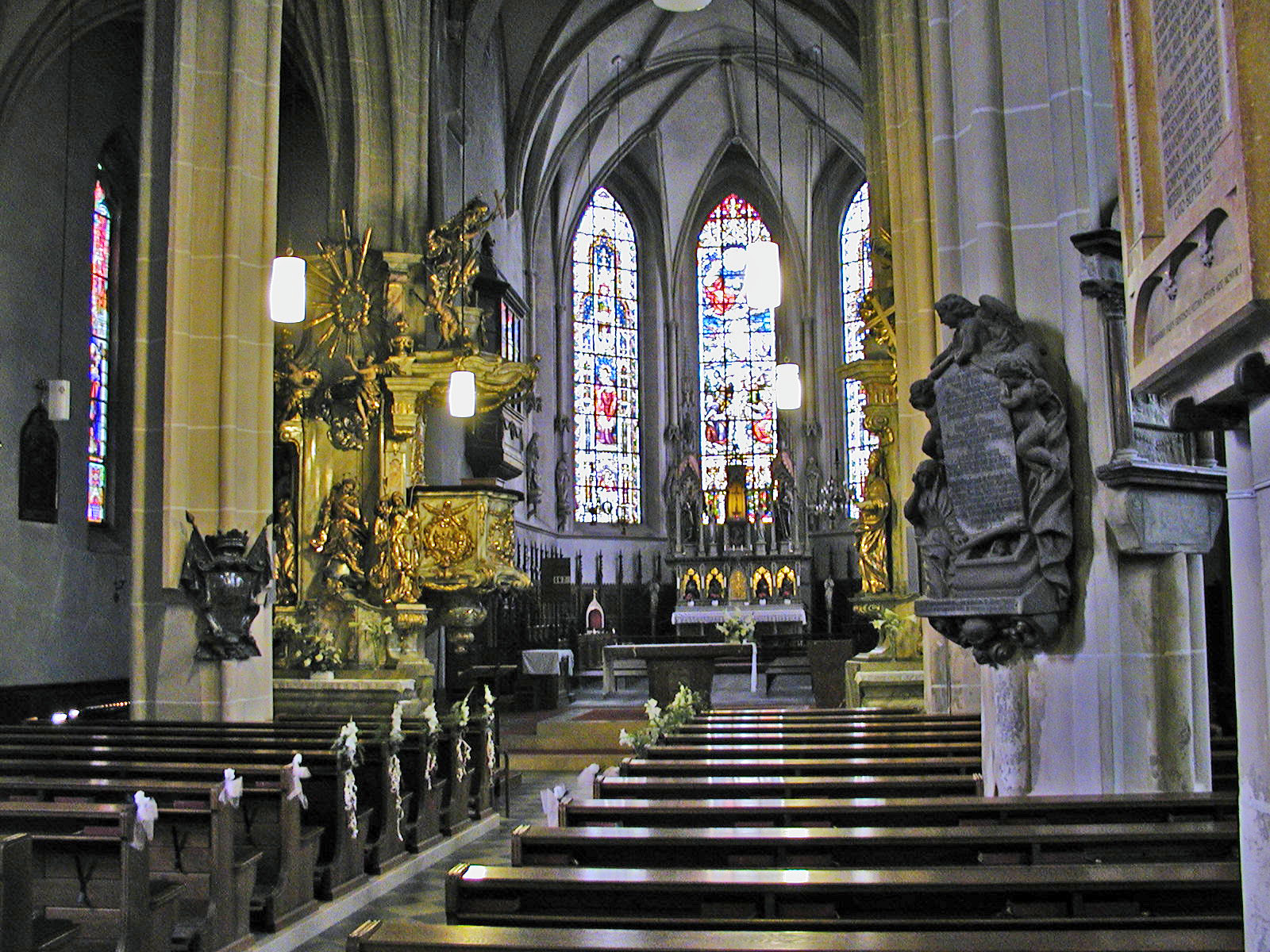 Inneres der Badener Stadtpfarrkirche St. Stephan, 2003-07-06